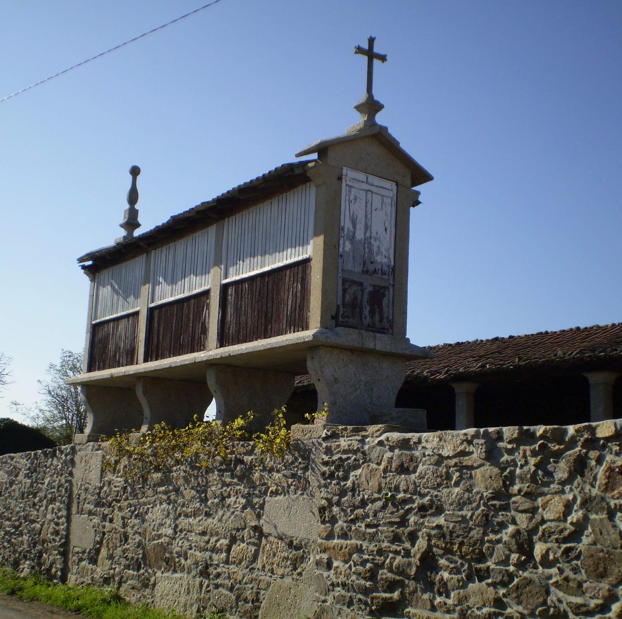 Hórreo tipo mahía, sobre o muro da aira, asentado en catro cepas copiformes. Leva porta penal e coroado con cruz latina lanceolada e lampión fusiforme con remate esférico. Sito no lugar de Santa Mariña, concello de Antas de Ulla (Lugo)